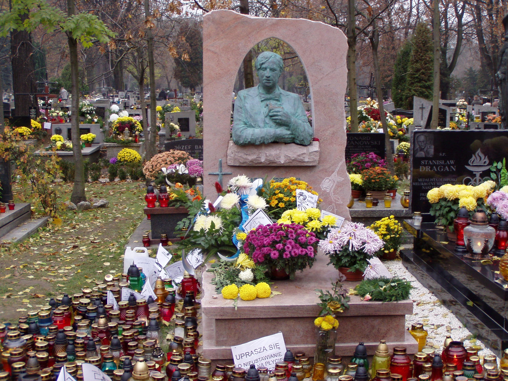 Grób Marka Grechuty w Alei Zasłużonych Cmentarza Rakowickiego w Krakowie